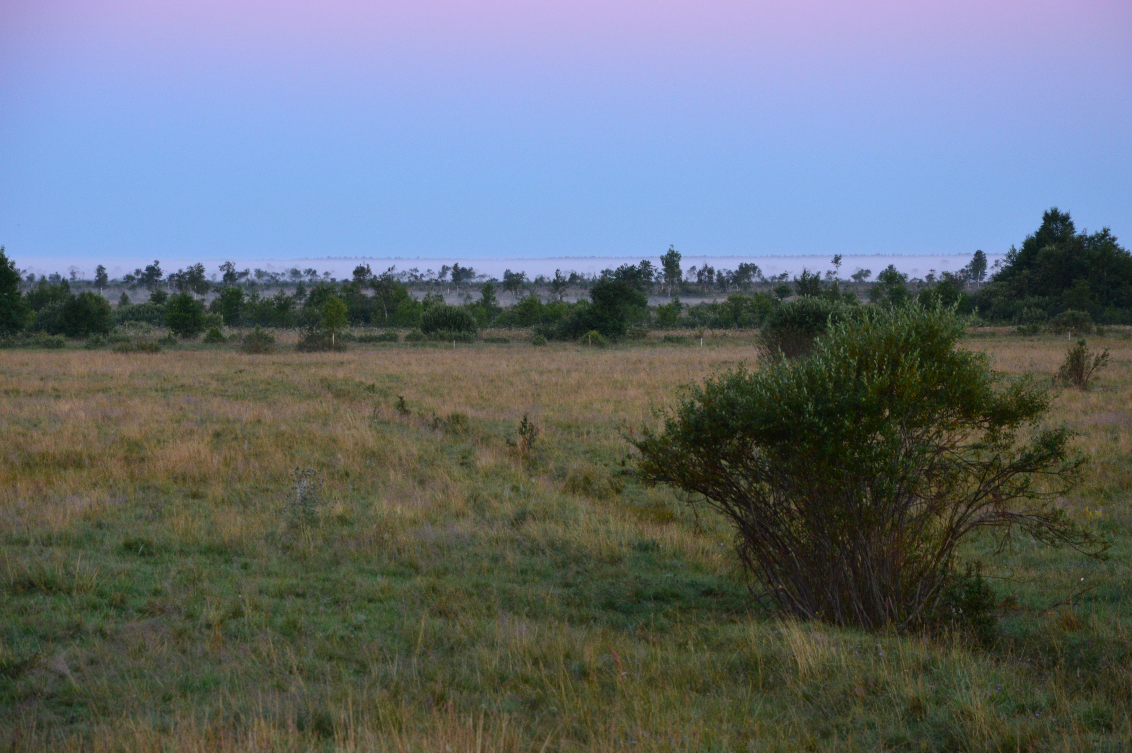 Avaste soo